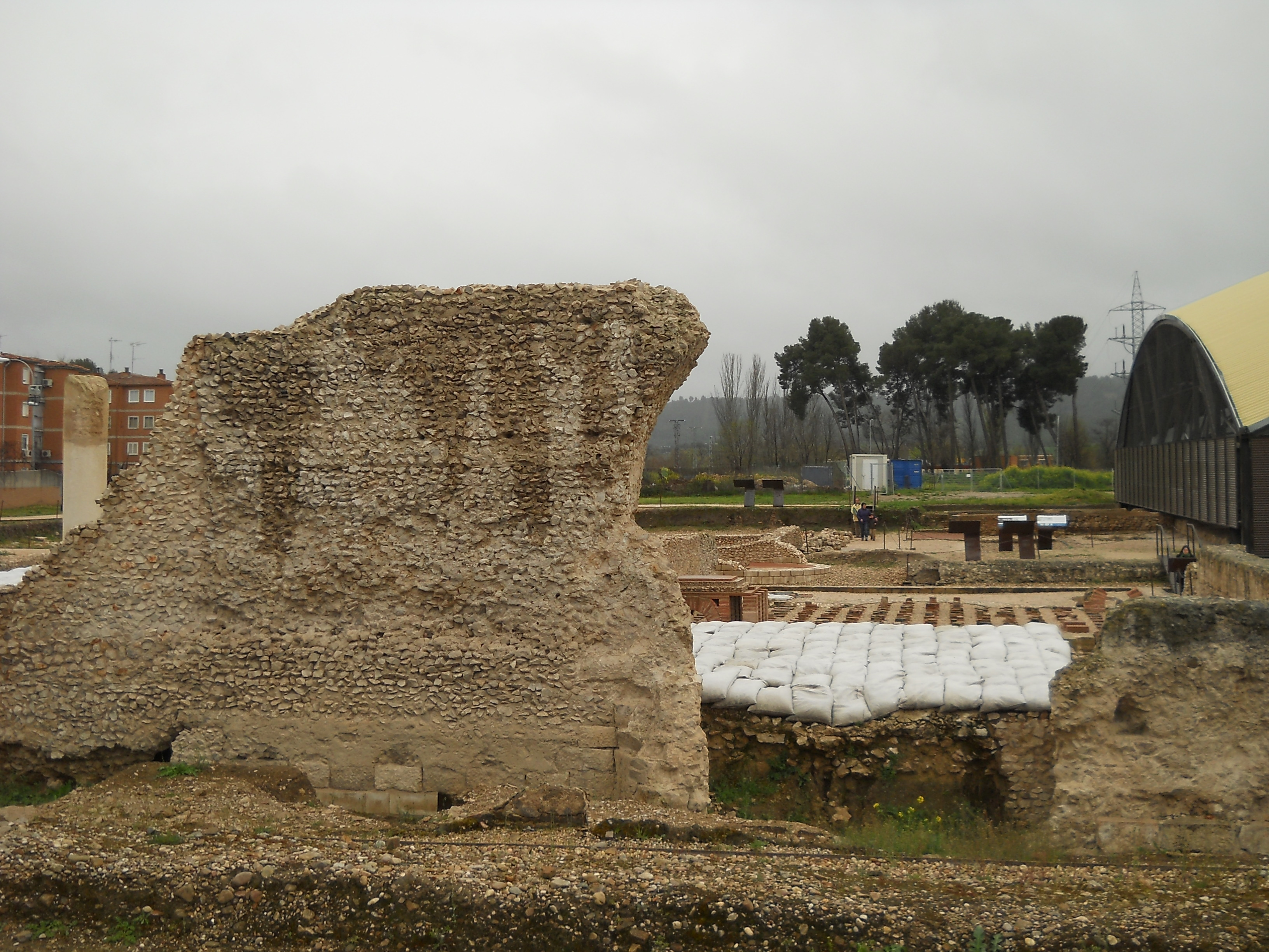 Paredón del Milagro, Yacimiento de Complutum, Alcalá de Henares, Madrid, España